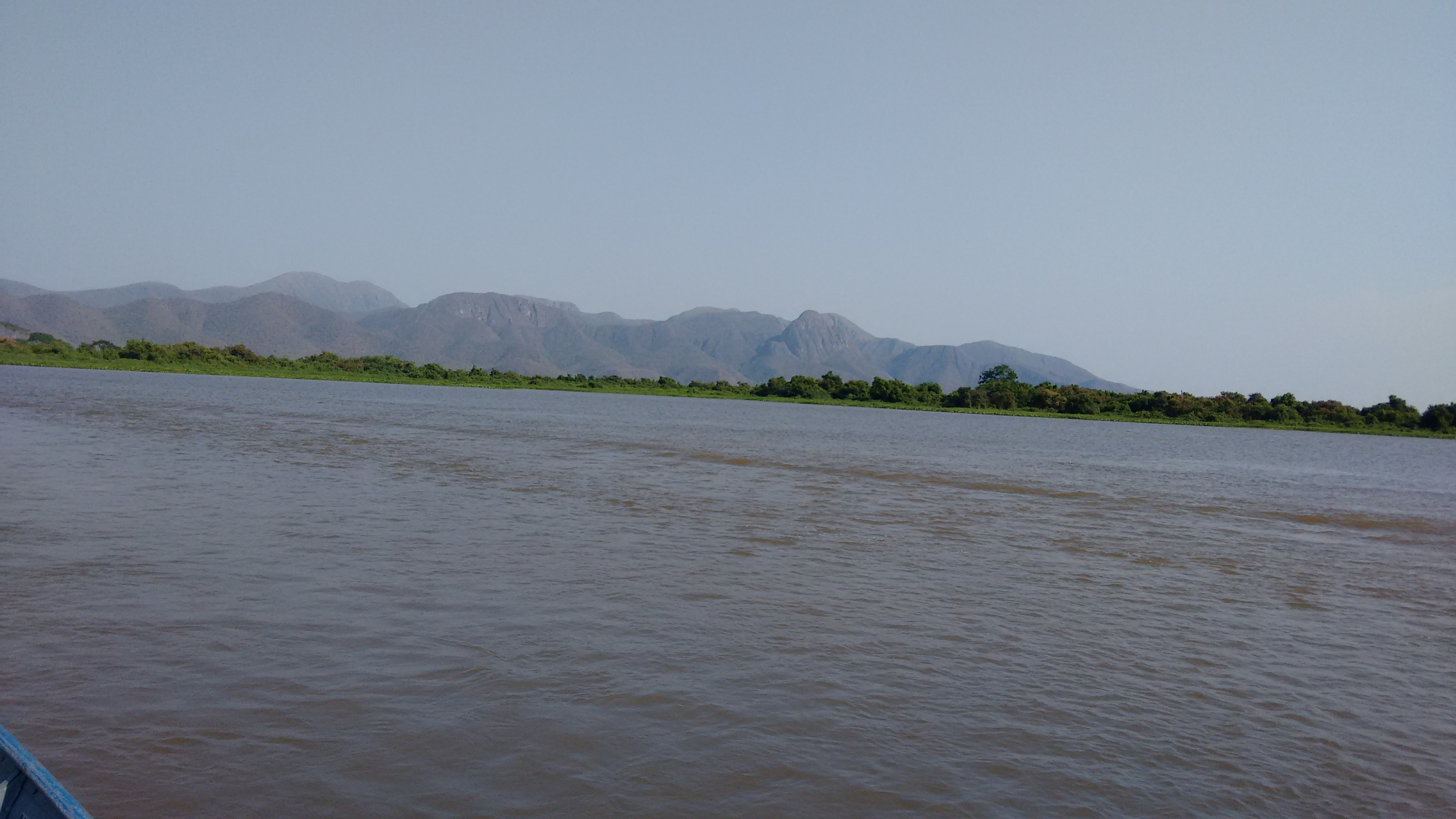 Rio Paraguai